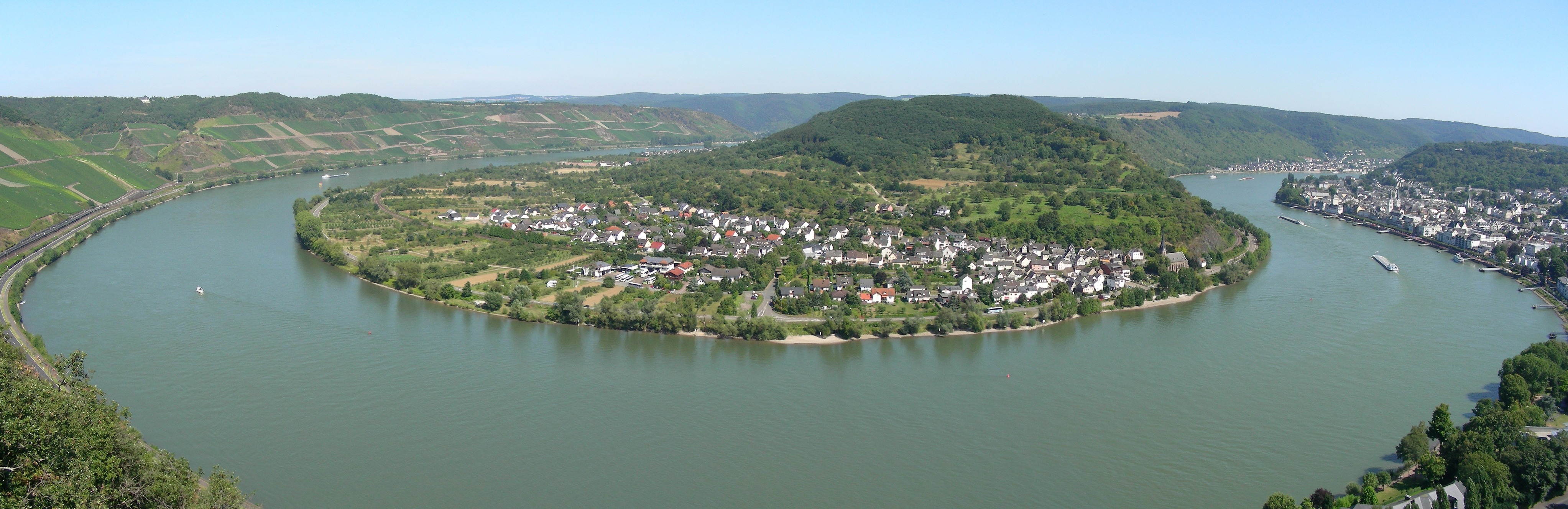 Die Rheinscheife von Gedeonseck